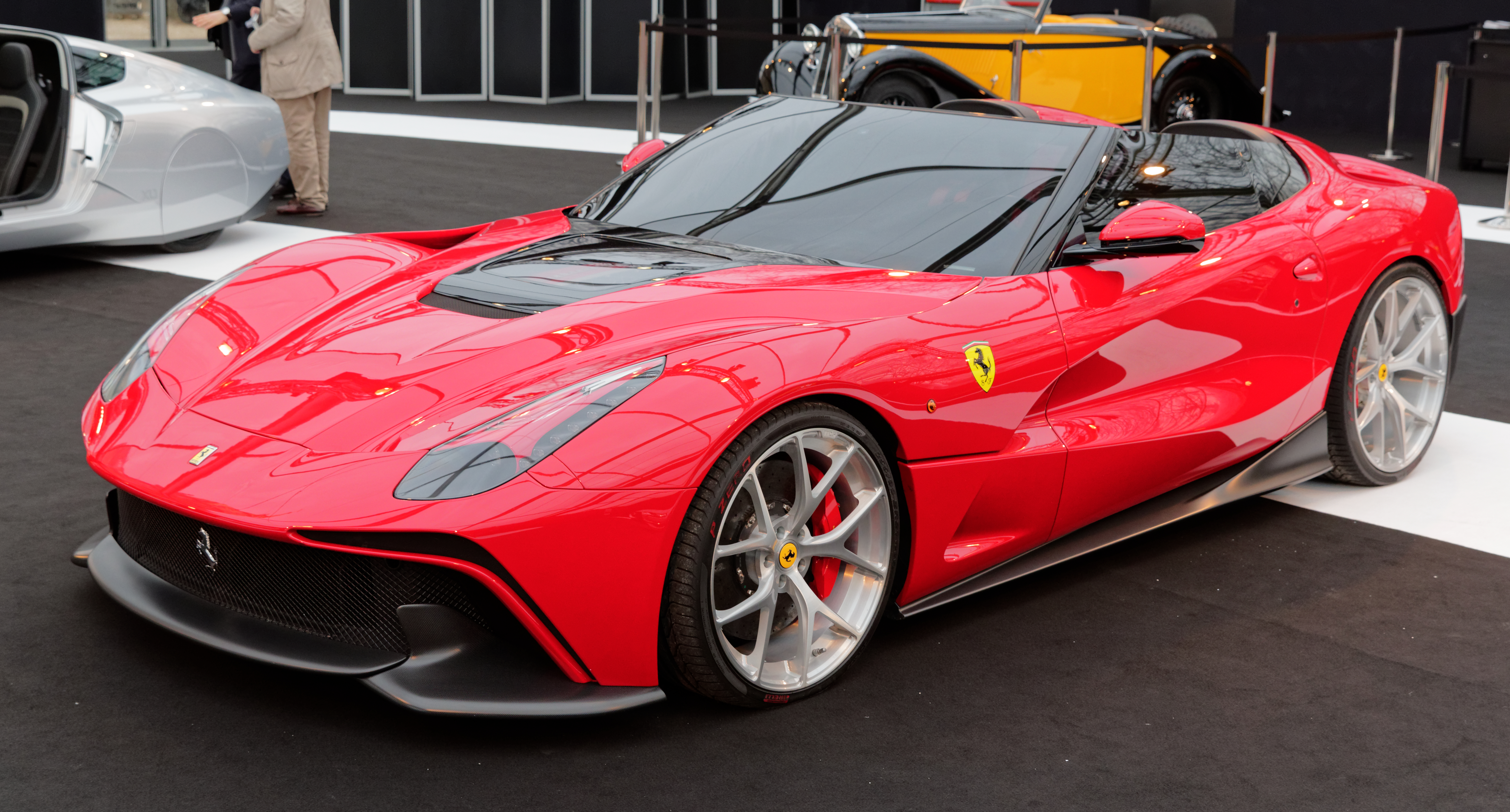 La Ferrari F12 TRS exposée lors du festival automobile international 2015.